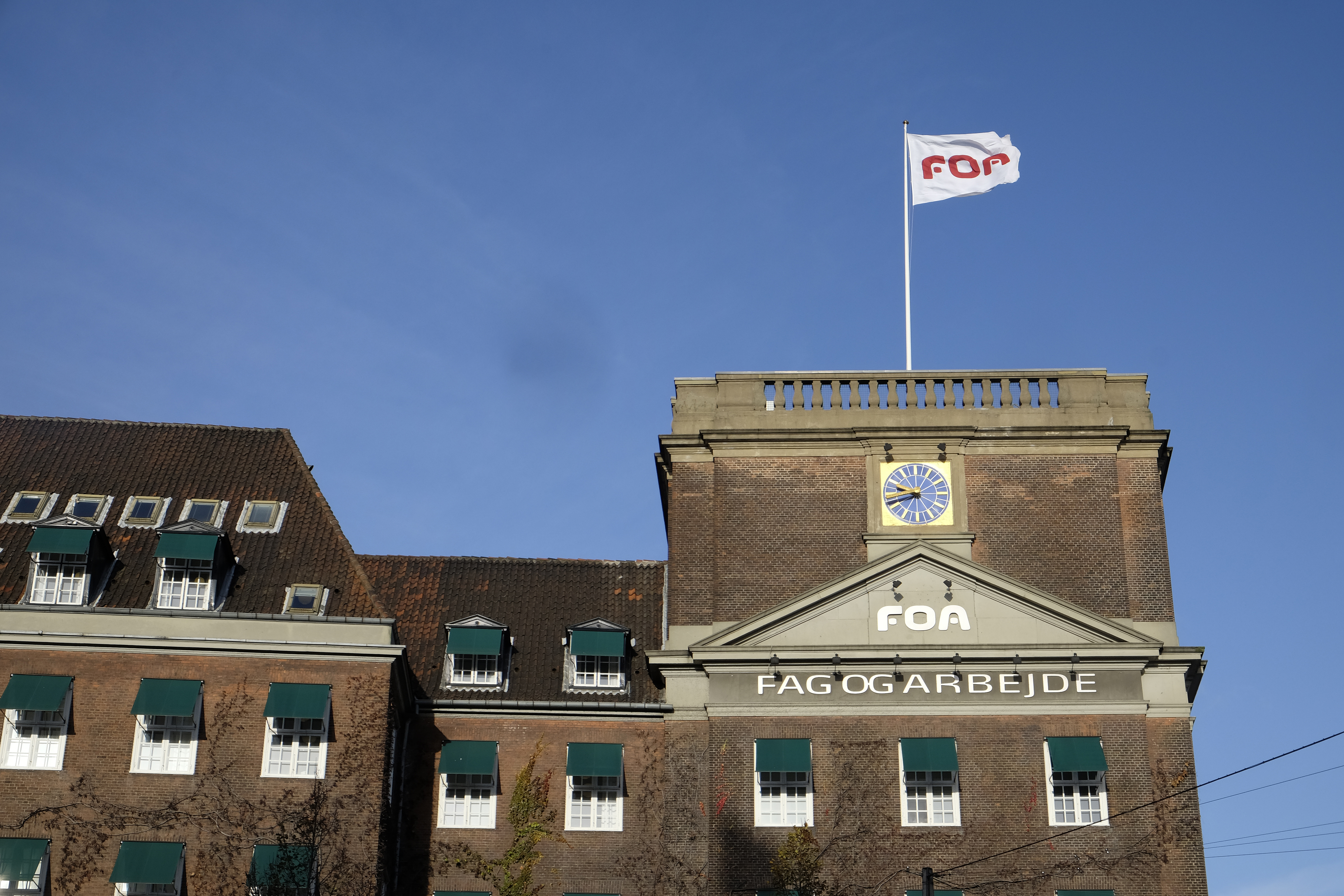 Fag og Arbejdes, FOA, domicil i København 20151109. Foto: News Øresund - Johan Wessman © News Øresund(CC BY 3.0) Detta verk av News Øresund är licensierat under en Creative Commons Erkännande 3.0 Unported-licens (CC BY 3.0). Bilden får fritt publiceras under förutsättning att källa anges (Foto: News Øresund + fotografnamn). The picture can be used freely under the prerequisite that the source is given . News Øresund, Malmö, Sweden. . News Øresund är en oberoende regional nyhetsbyrå som ingår i oberoende dansk-svenska kunskapscentrat Øresundsinstituttet som drivs utan vinstsyfte med finansiering från närmare 100 medlemmar i offentlighet, akademi och näringsliv.